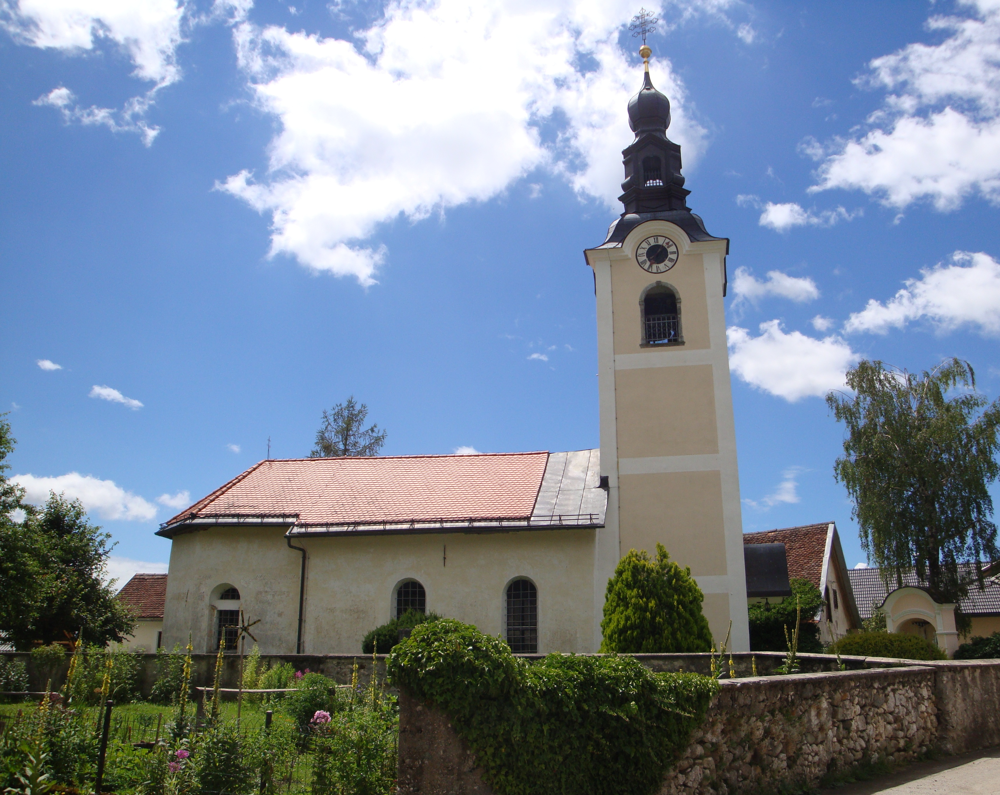 Cerkev sv. Klemena v Tupaličah, Slovenija.